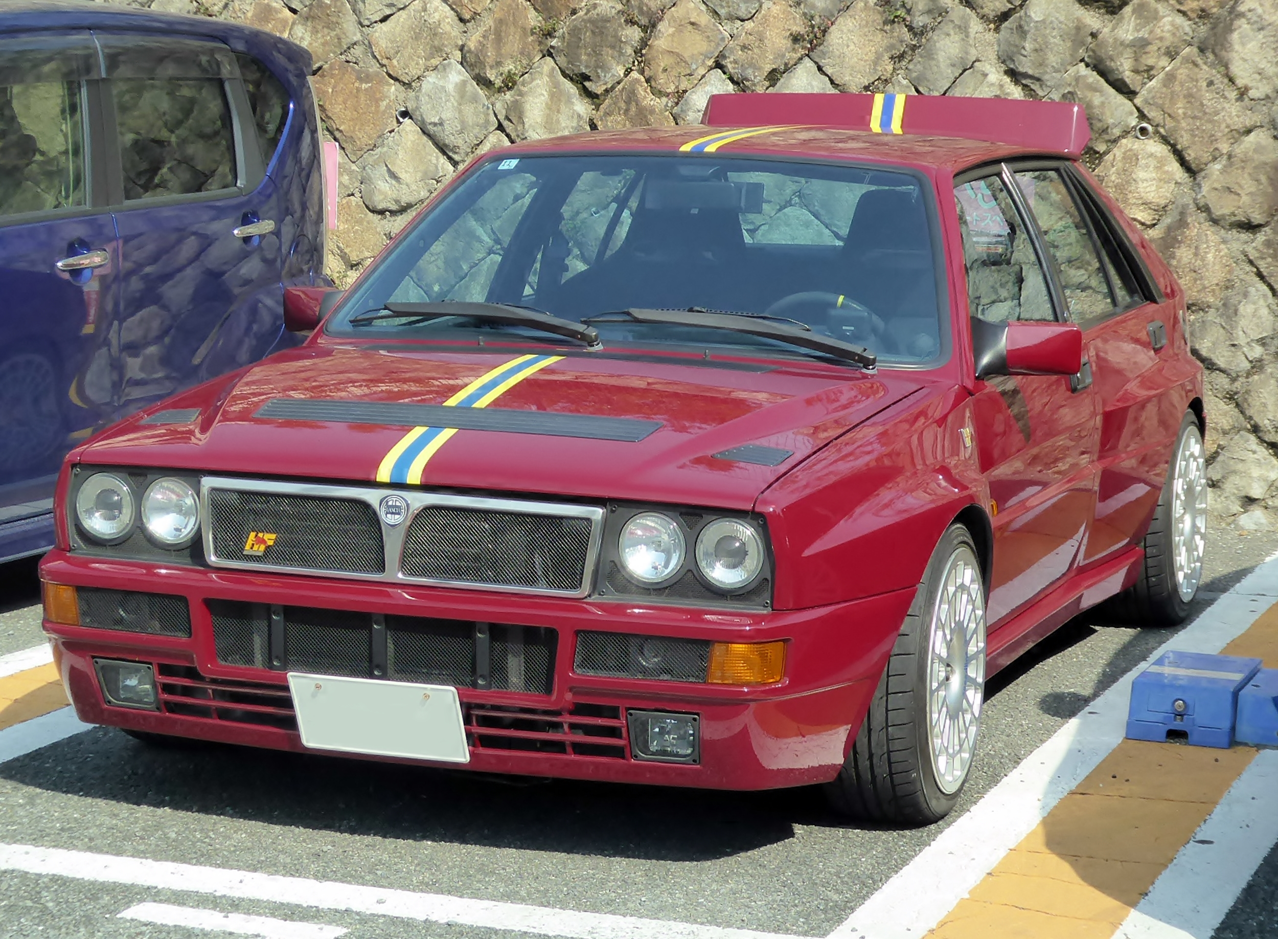 E-L31E5型ランチア・デルタHFインテグラーレ・エボルツィオーネII・コレツィオーネ・エディツィオーネ・フィナーレをフロントから撮影。